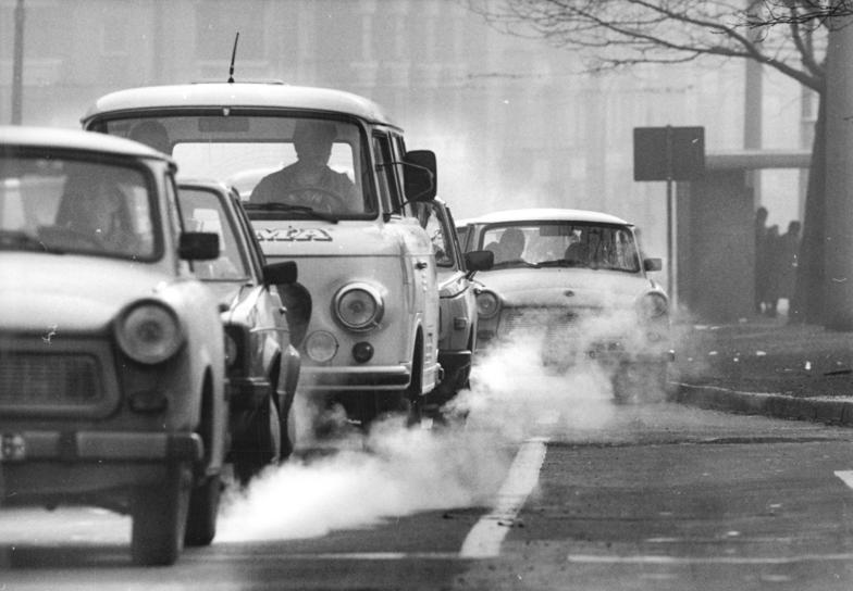 Berlin, Bersarinstraße, Verkehr, Smog ADN-ZB Zimmermann 28.12.89 Berlin-Dunst über dem Stadtzentrum-Weitflächige Dunstschichten zeigten sich über Mittag auch in der Bersarinstraße im Stadtbezirk Friedrichshain. An ihnen hatten Autoabgase sicher einen nicht unbedeutenden Anteil.